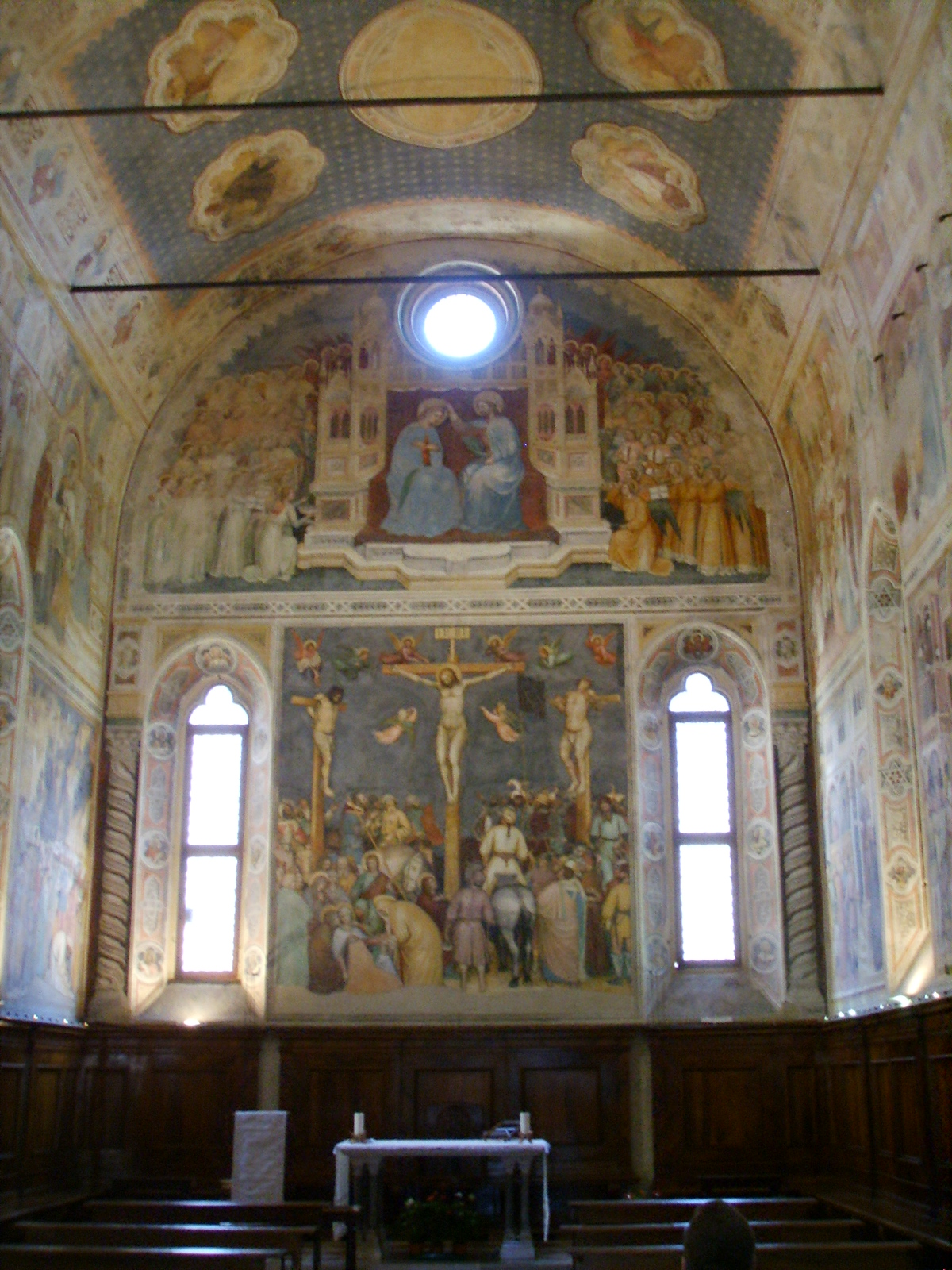 Altichiero, oratorio di san giorgio, parete dell'altare